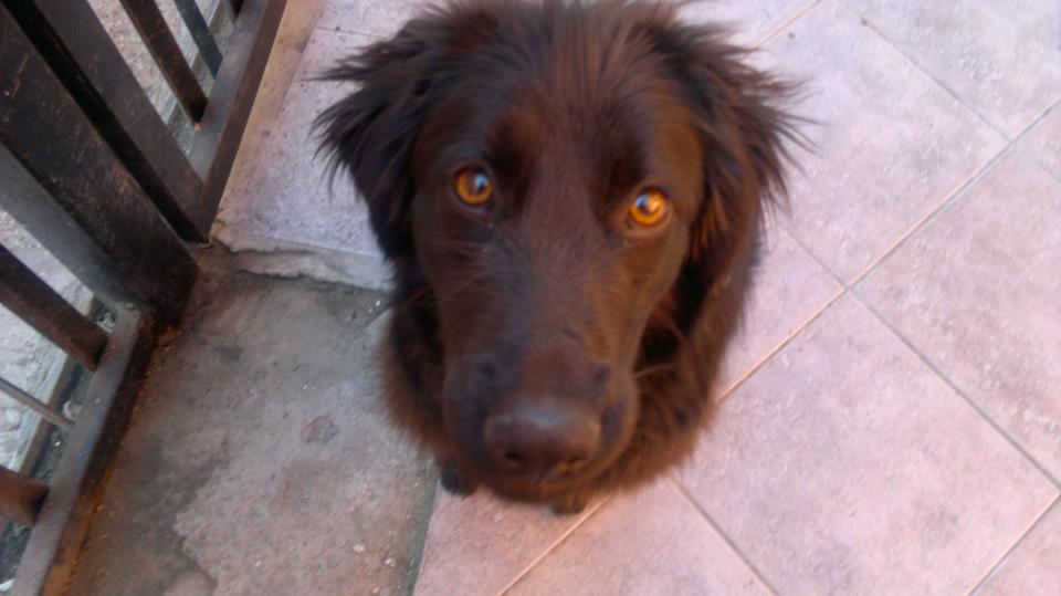 Es mi Perro Mestizo llamado Raymond.